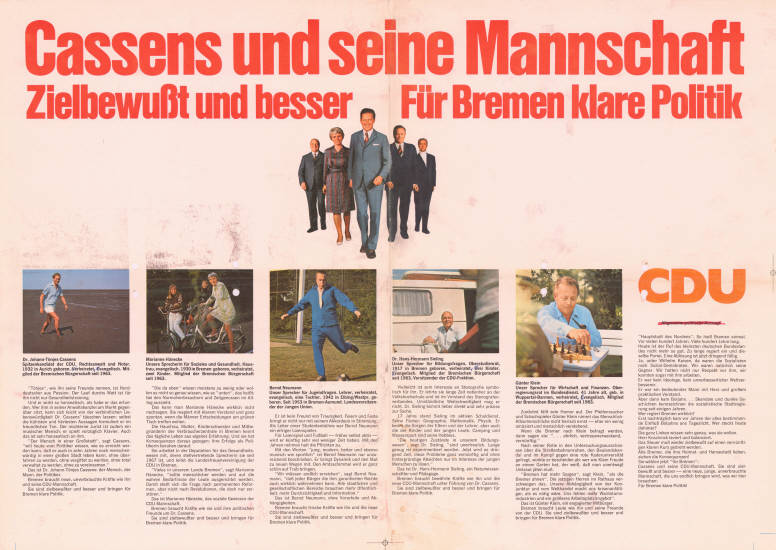 Cassens und seine Mannschaft Zielbewußt und besser Für Bremen klare Politik ... Abbildung: Fotocollage Kommentar: Vorstellung der Kandidaten mit einer Kurzbiografie sowie ihren Funktionen, Charaktereigenschaften, Zielen und Vorstellungen: Dr. Johann-Tönjes Cassens, Marianne Hänecke, Bernd Neumann, Dr. Hans-Hermann Sieling, Günter Klein Plakatart: Kandidaten-/Personenplakat mit Porträt Objekt-Signatur: 10-005 : 351 Bestand: Plakate zu Bürgerschaftswahlen Bremen (10-005) GliederungBestand10-18: Plakate zu Bürgerschaftswahlen Bremen (10-005) » CDU Lizenz: KAS/ACDP 10-005 : 351 CC-BY-SA 3.0 DE